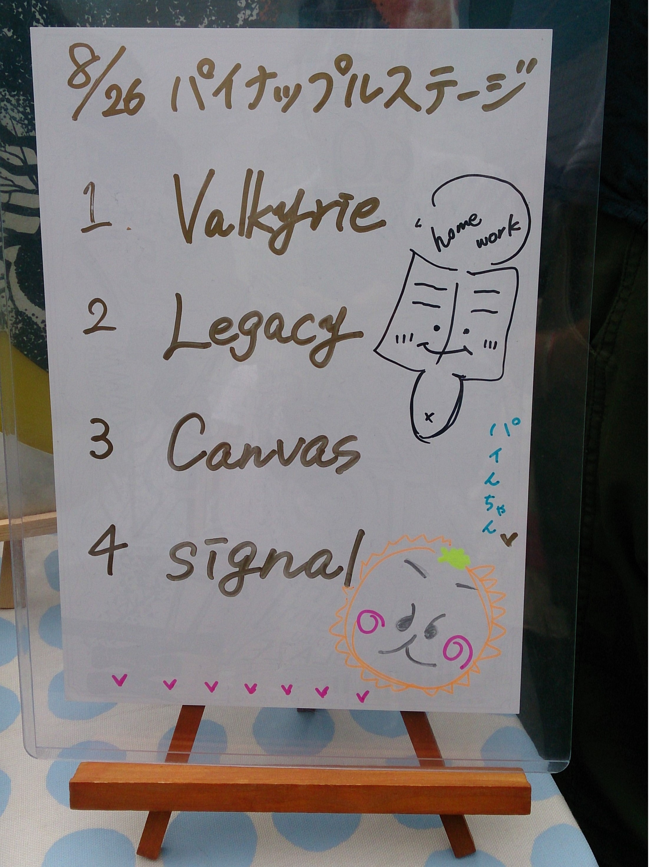 amiinAセトリボード(20170826(1))